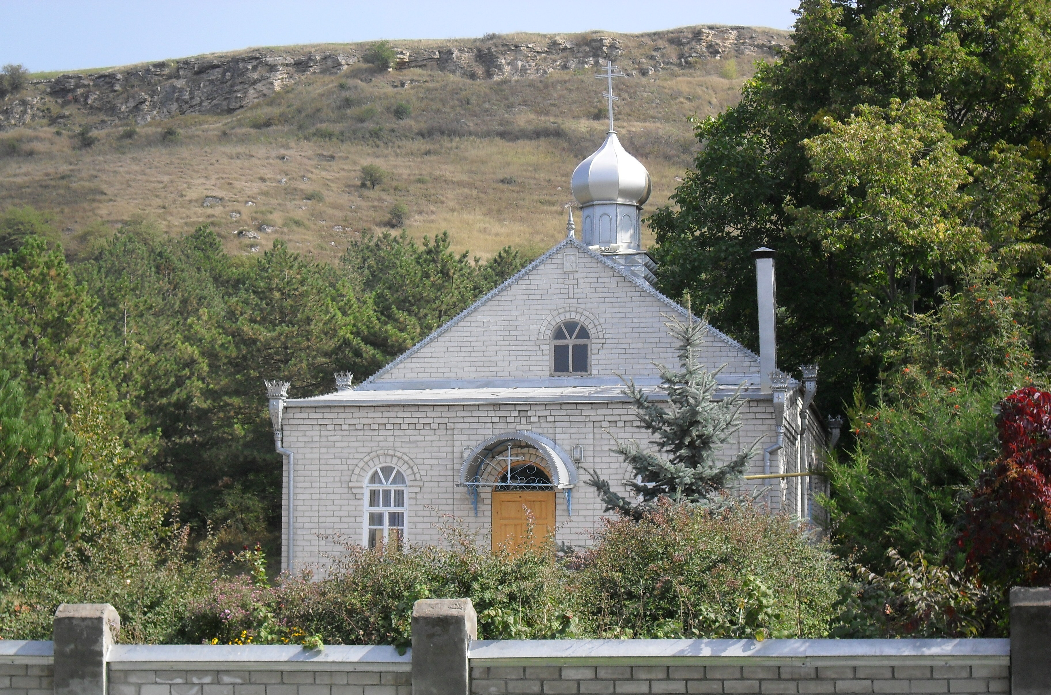 Храм Казанской иконы Божьей Матери в селе Юца